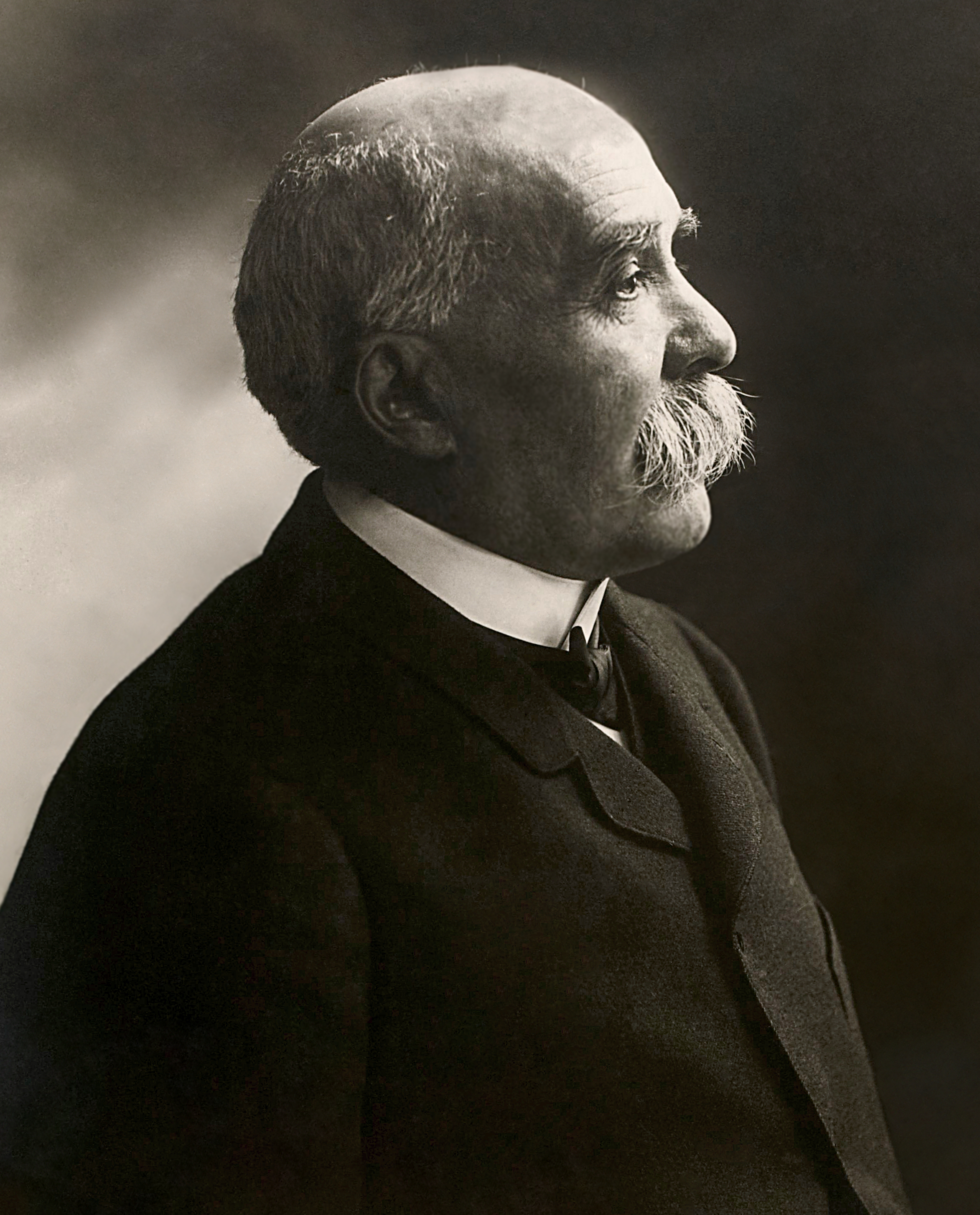 Georges Clemenceau (1841 - 1929).